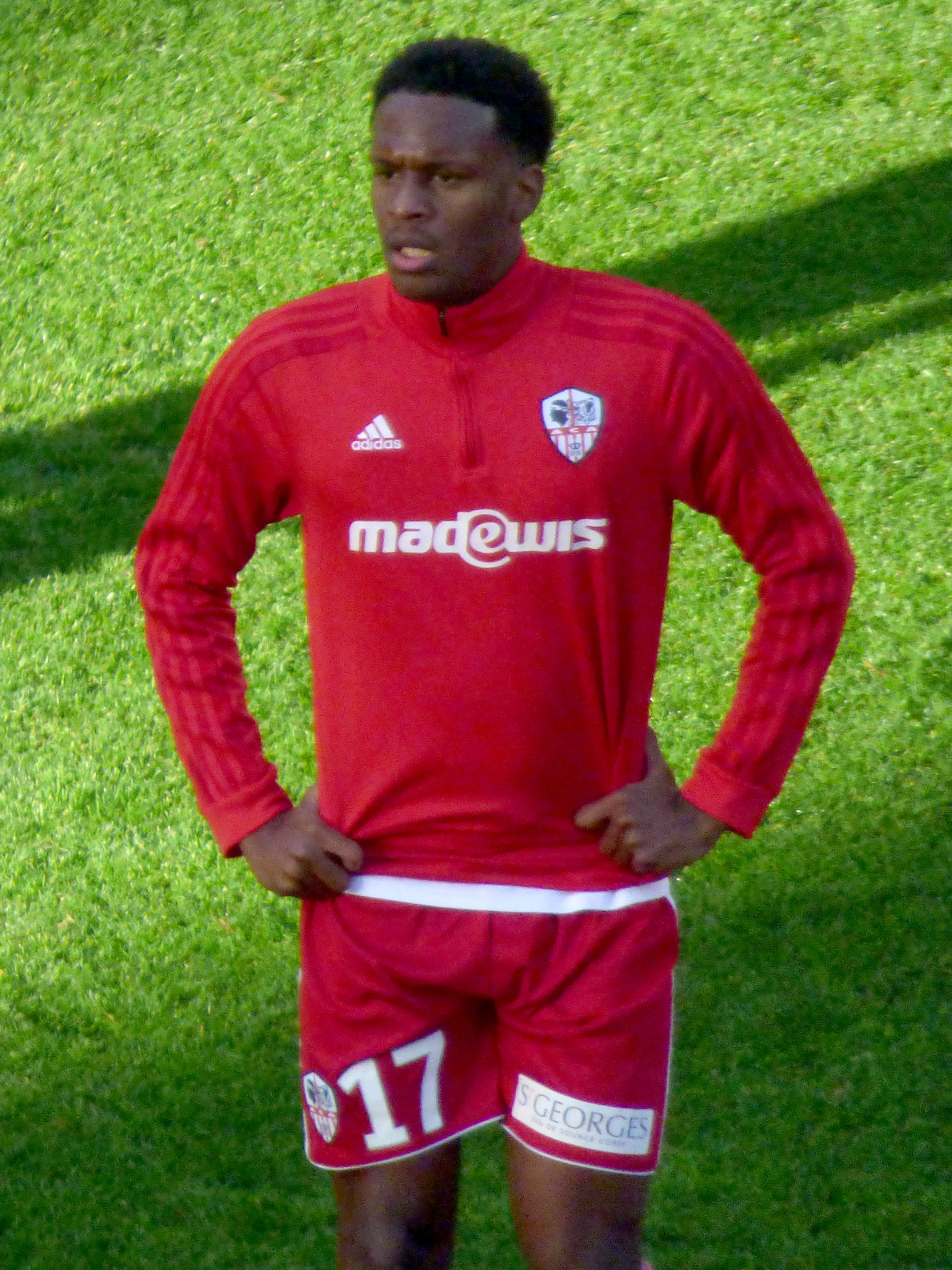 Manuel Cabit avant le match RC Lens - AC Ajaccio, comptant pour la dix-neuvième journée du championnat de France de Ligue 2 2018-2019, le 22 décembre 2018, au Stade Bollaert-Delelis de Lens.